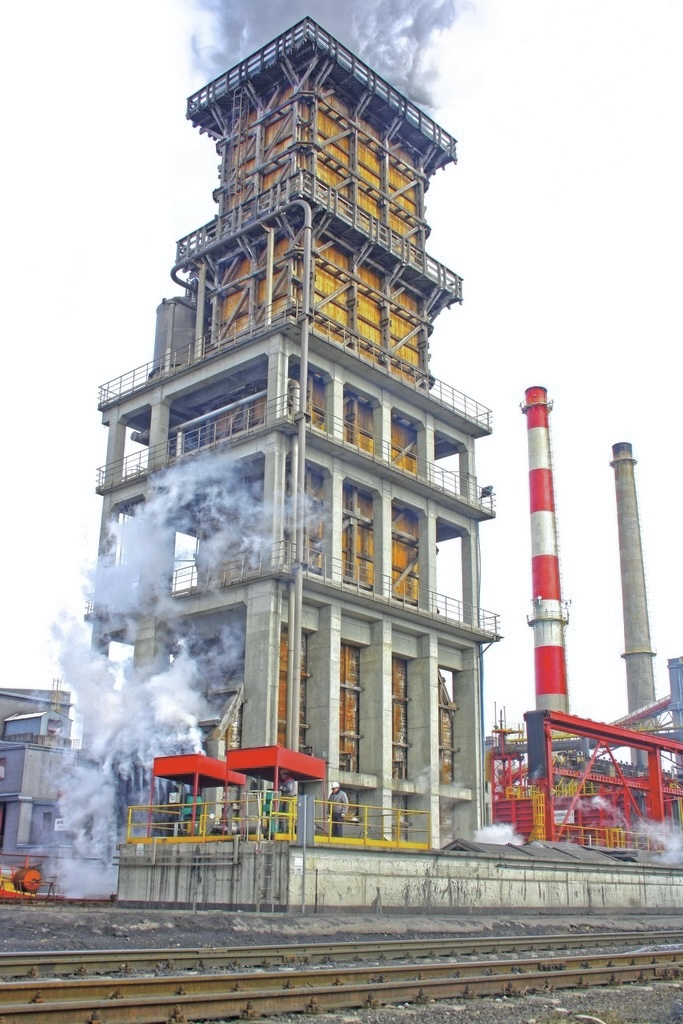 Zdjęcie przedstawia wieżę gaszenia koksu nr 1 podczas procesu gaszenia. Na prawo od wieży widoczny jest fragment baterii koksowniczej nr 1 wraz kominami opalania baterii nr 1 i 2 oraz wieża węgla nr 1. Przed wieżą znajduje sie osadnik koksiku. Na prawo od wieży z tyłu znajduje się zmodernizowana młynownia węgla.